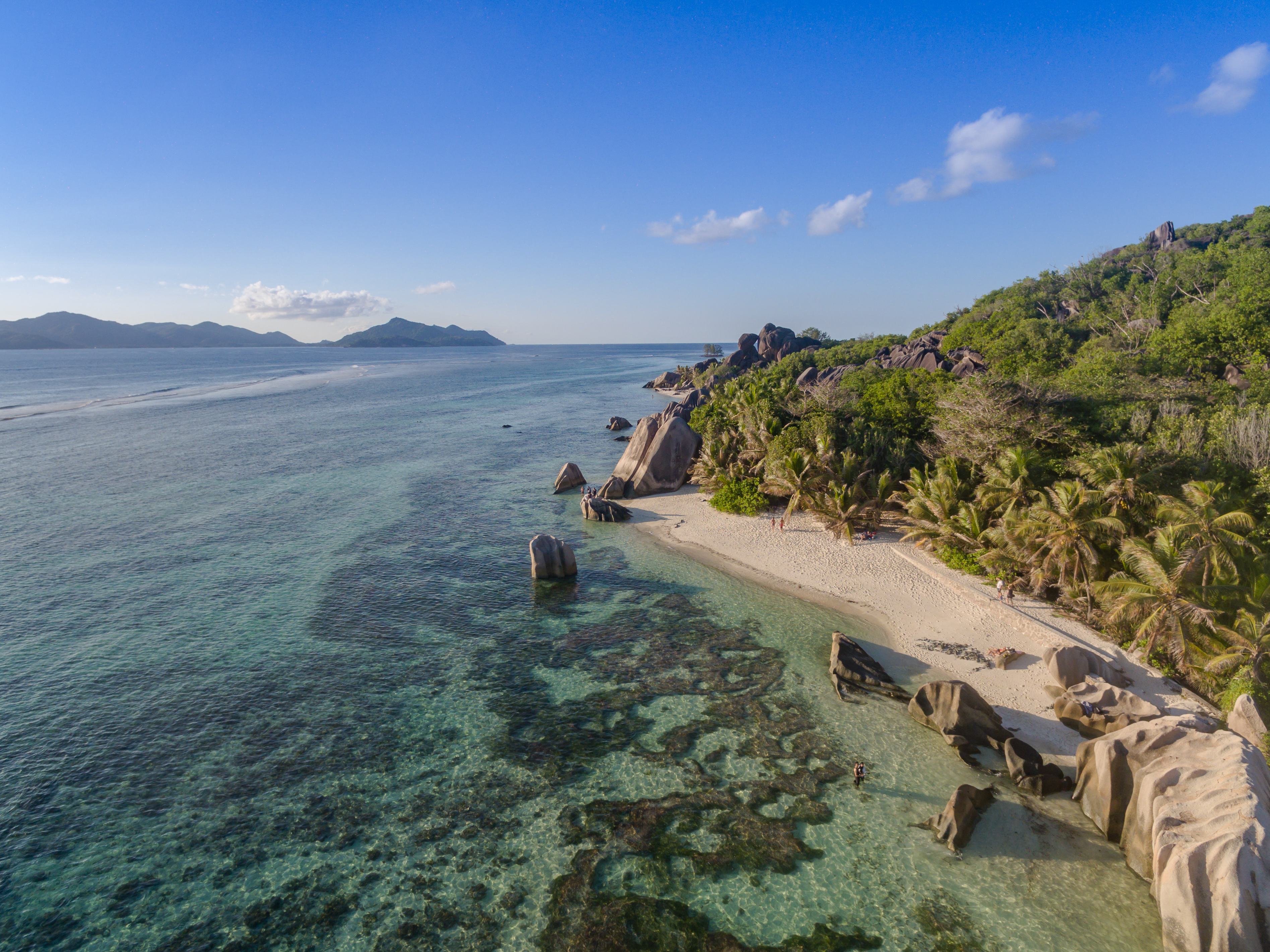 Traumstrand Anse Source d'Argent La Digue Seychellen